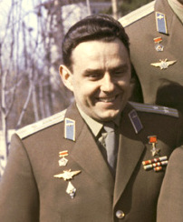 V. M. Komarov